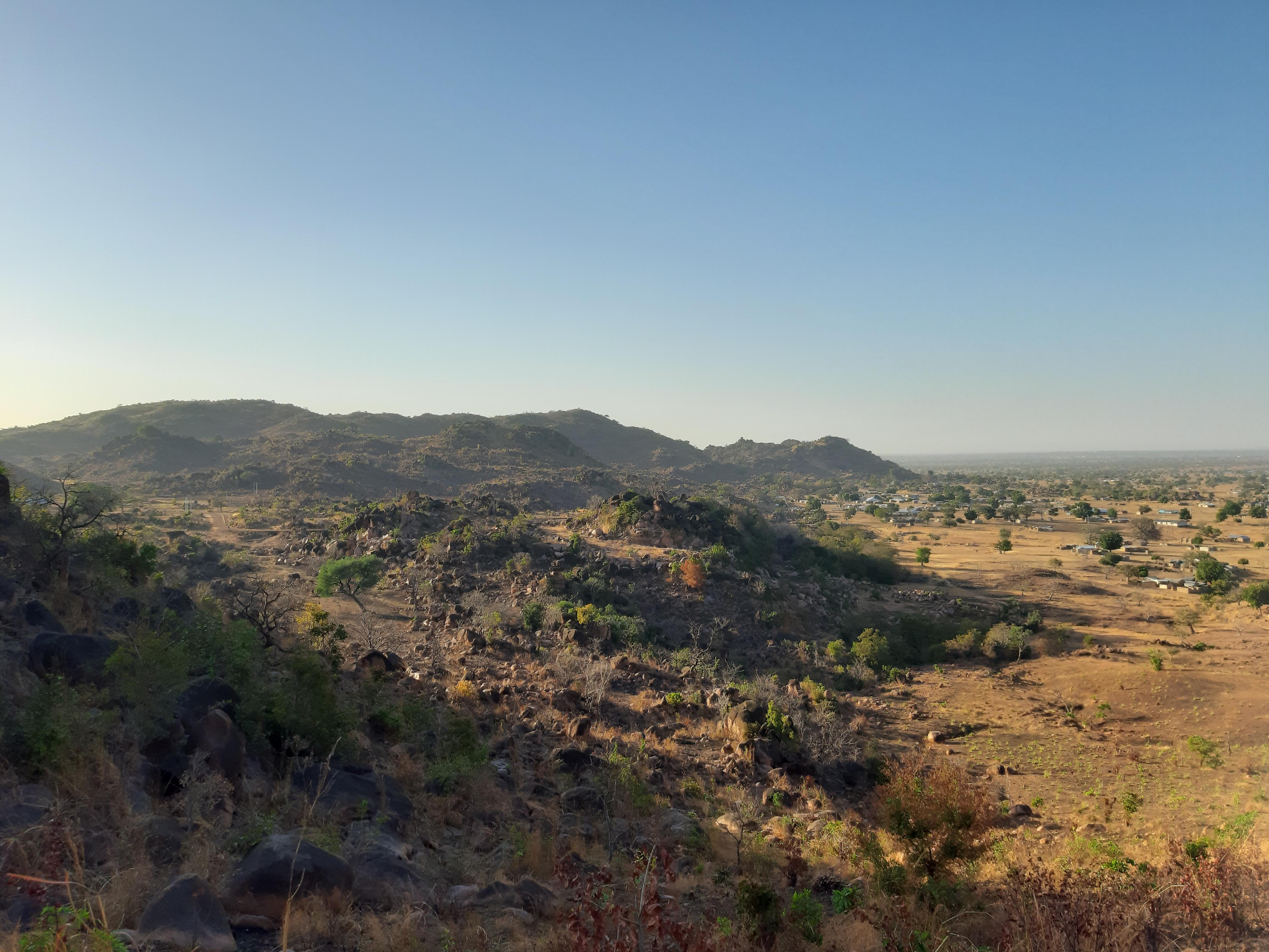 Tongo Hills from the West Side